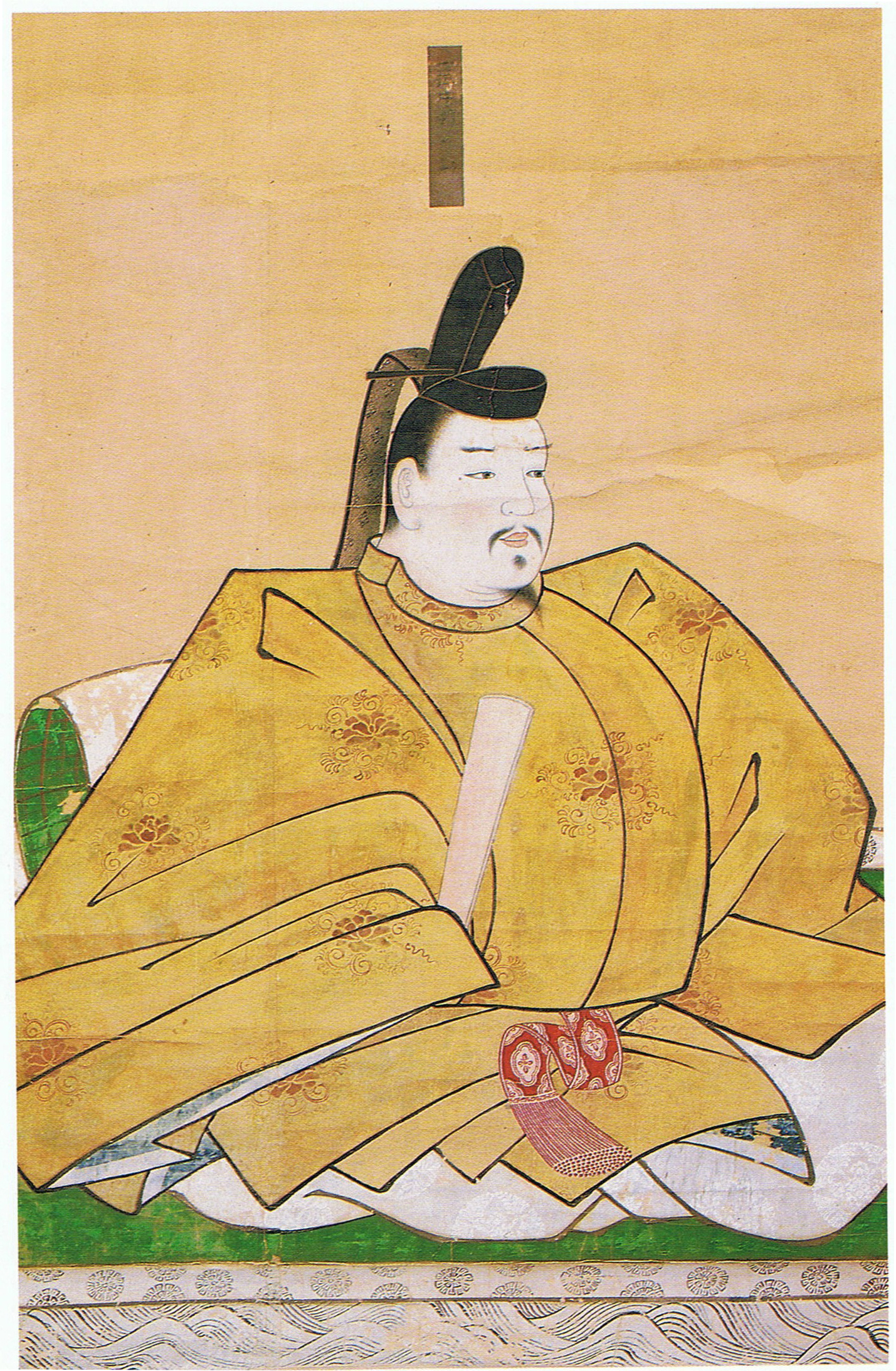 平資盛像